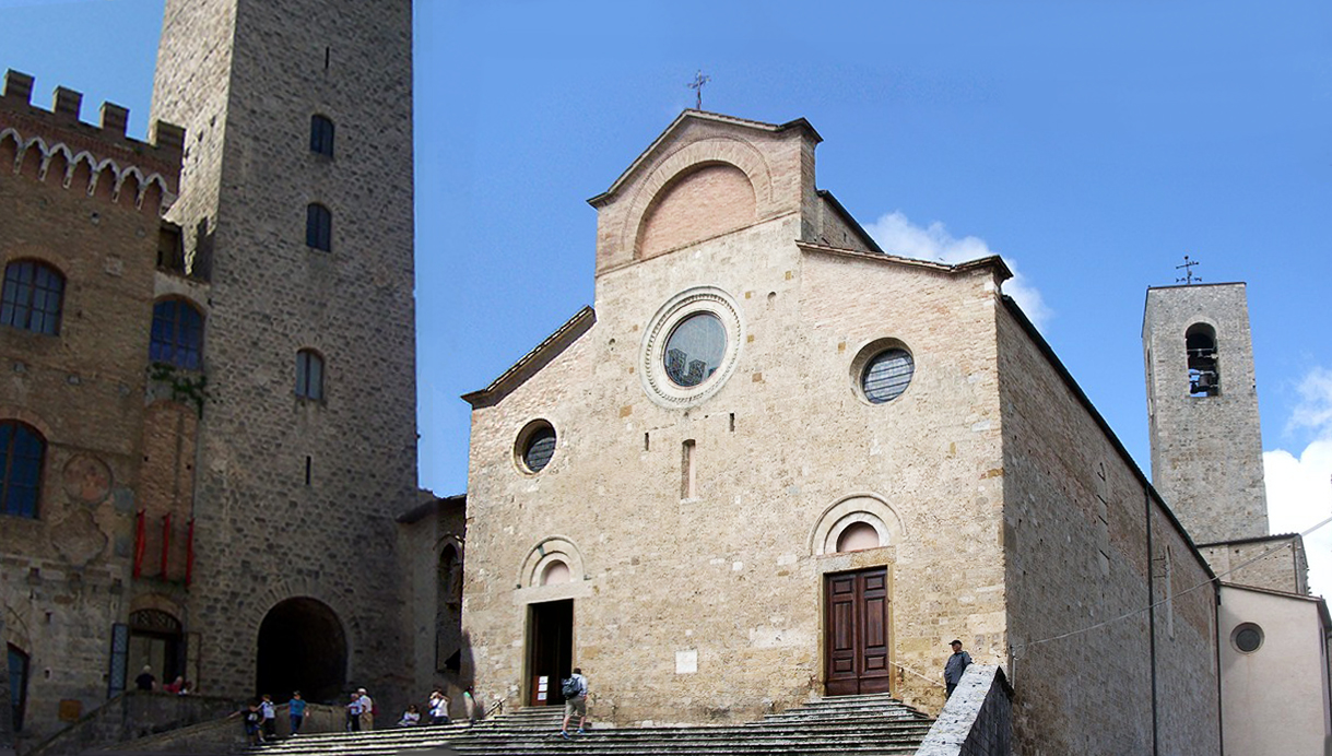 San Gimignano - Collegiata